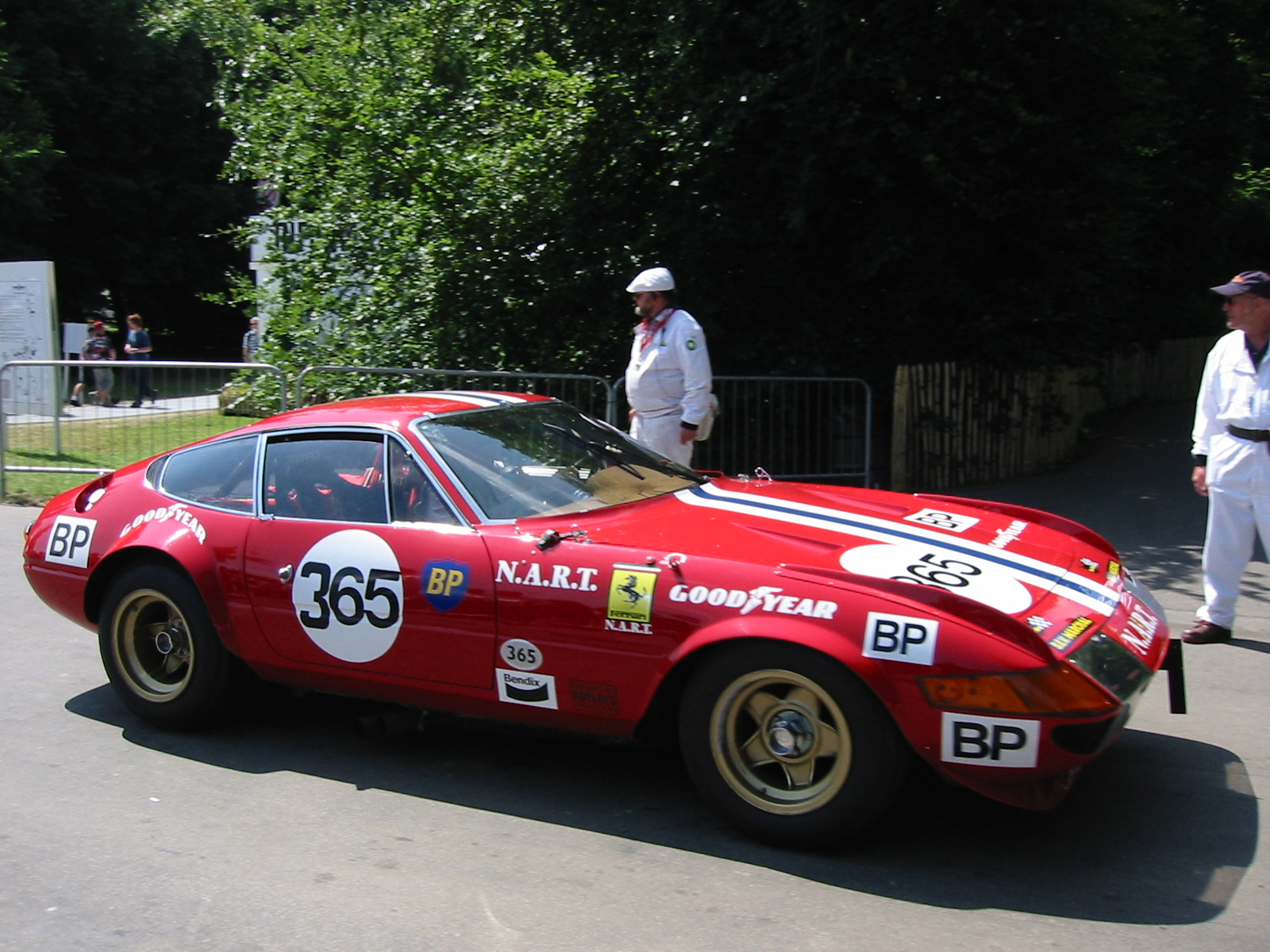 4 cam V12